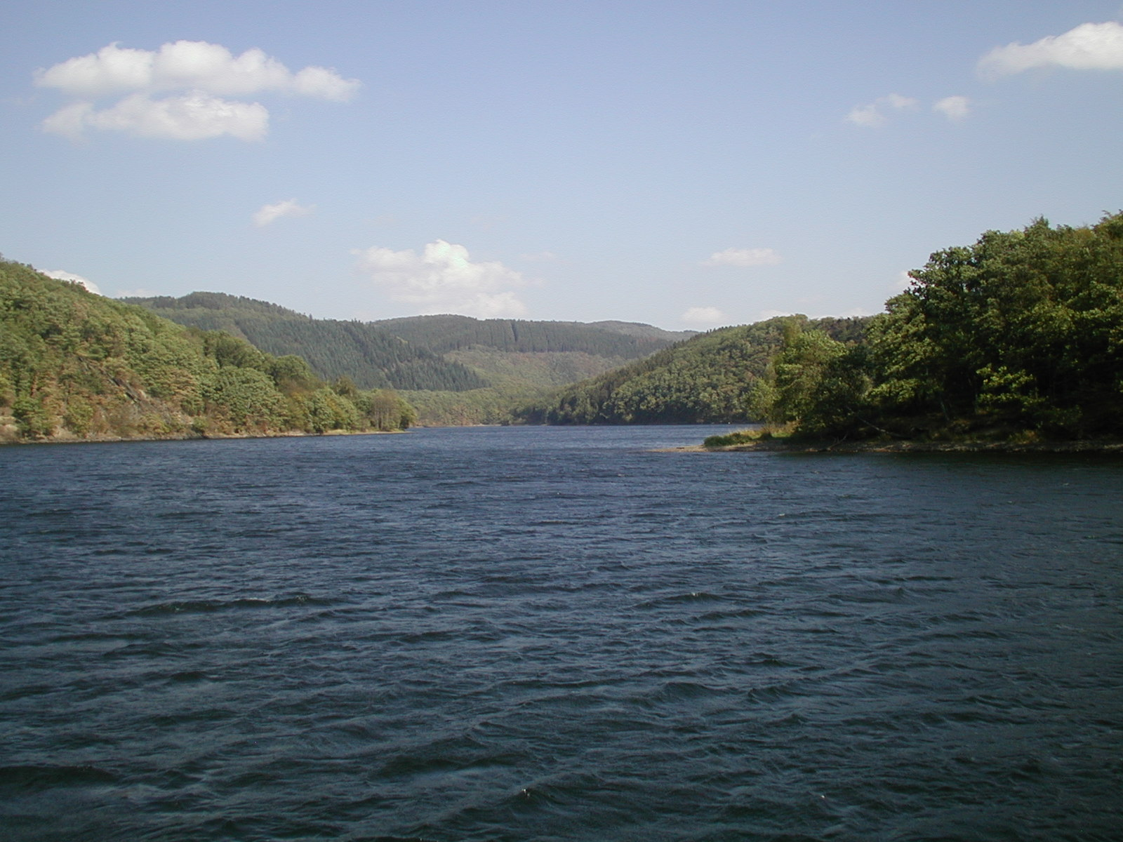 Rurtalsperre zwischen Einruhr und Rurberg (der sogenannte Obersee)